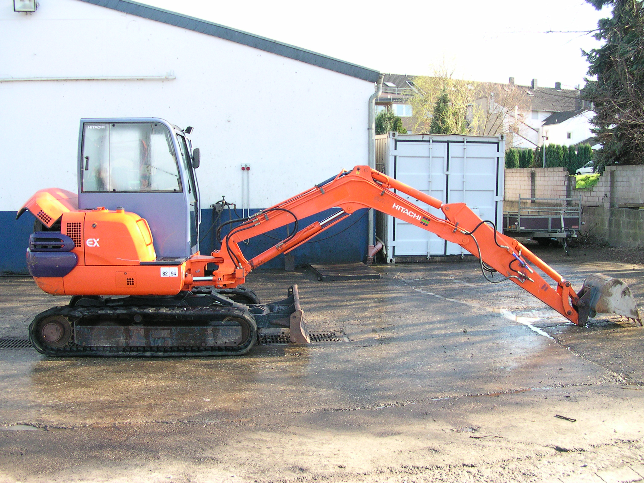 Hitachi EX30 mit Kabine, Tieflöffel und Schild, 3 t Gesamtgewicht, Baujahr 2001